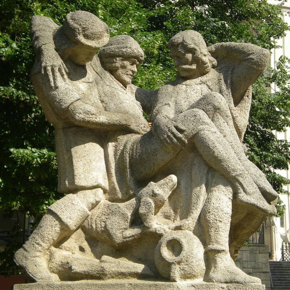 Der denkmalgeschützte Hannakenbrunnen im 1. Wiener Gemeindebezirk Innere Stadt